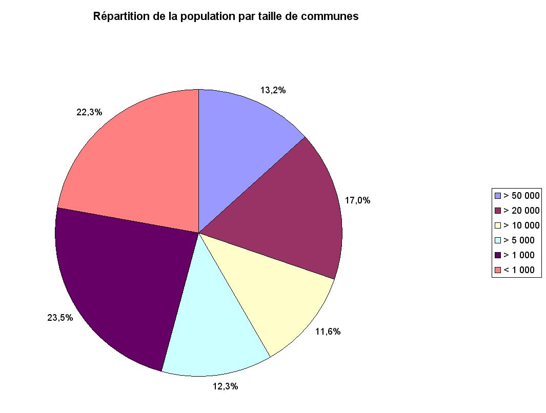 Répartition de la population 2007 des Pyrénées-Atlantiques par taille de ville